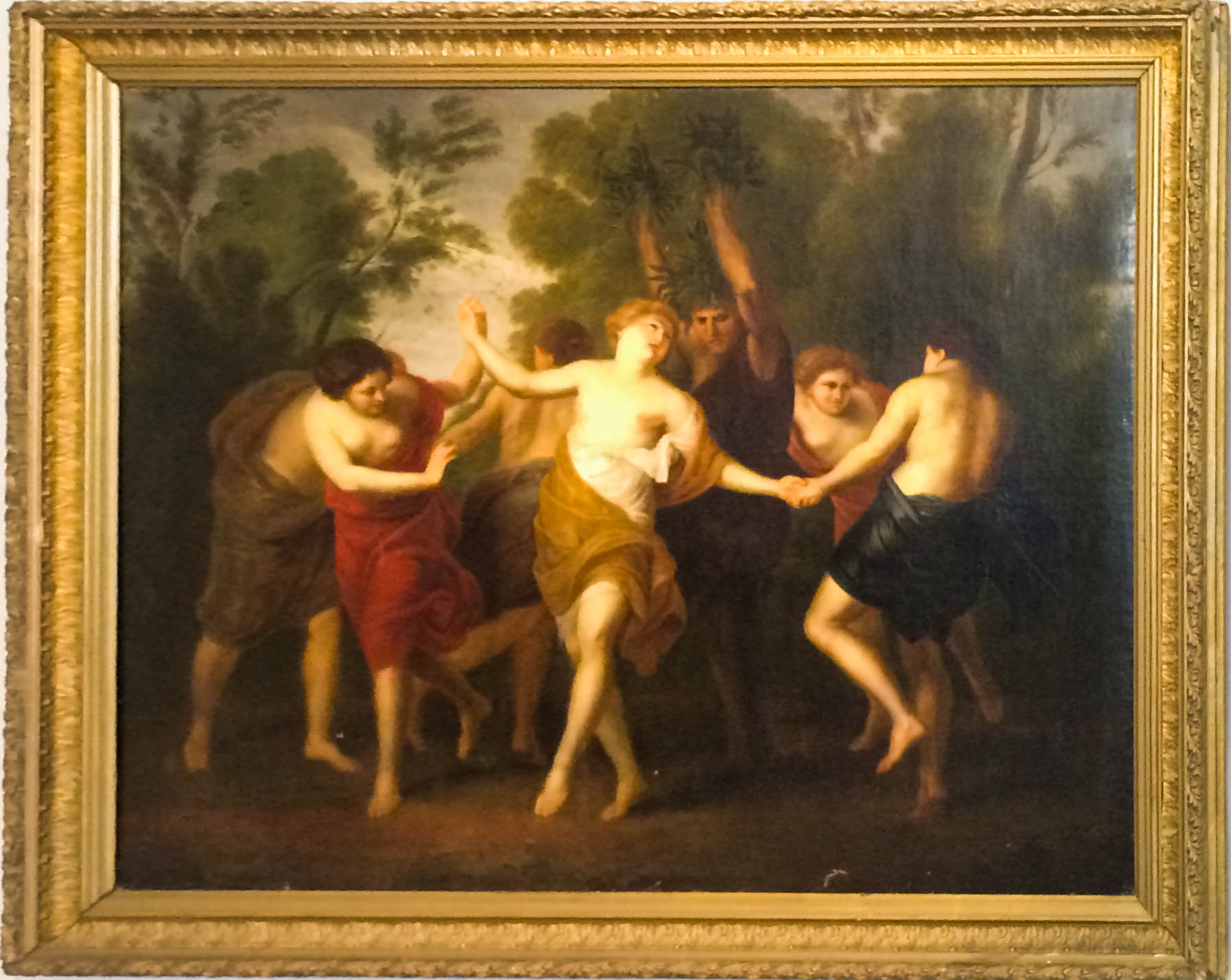 Sebastiano Brunetti - Vacchanalia, XVII century